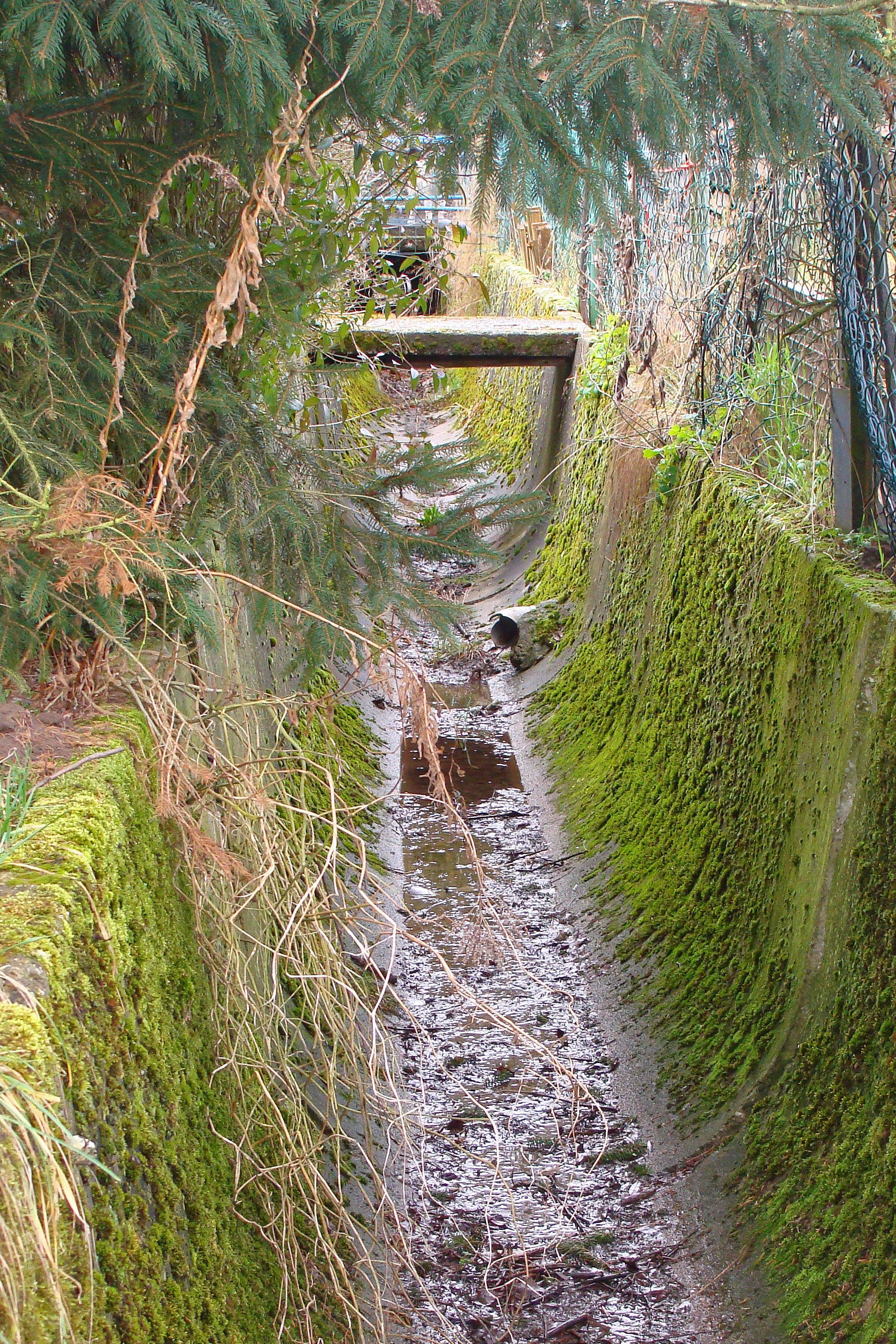 Le ruisseau canalisé du Lauterbach à Carling (Moselle). Photographie prise le 16 février 2014.